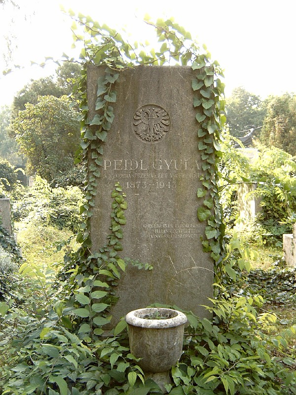 Peidl Gyula sírja Budapesten. Kerepesi temető: 34-2-82.